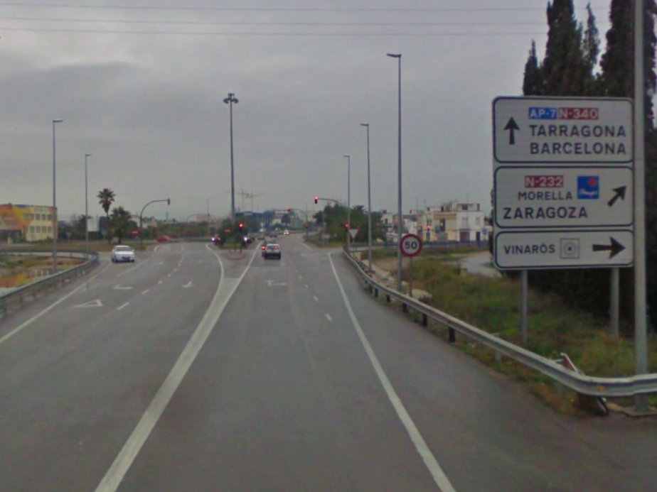 Carretera N-340 a su paso por Vinaroz, Castellón, España